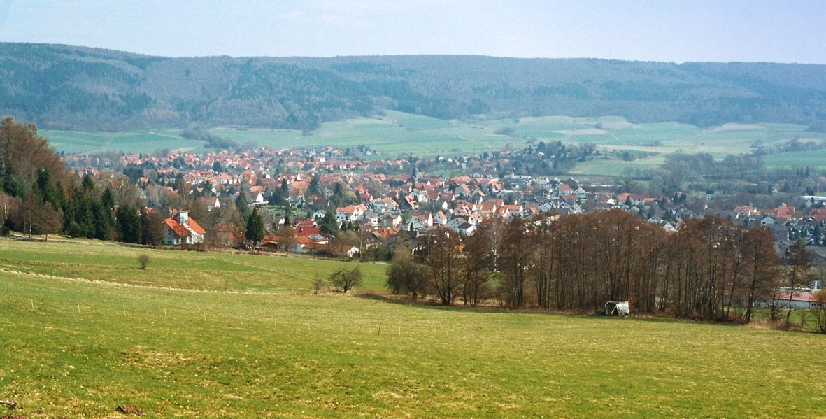 Reinhardshagen - Veckerhagen Gesamtansicht Quelle: selbst fotografiert Fotograf/Zeichner: presse03 Datum: 08.04.2006